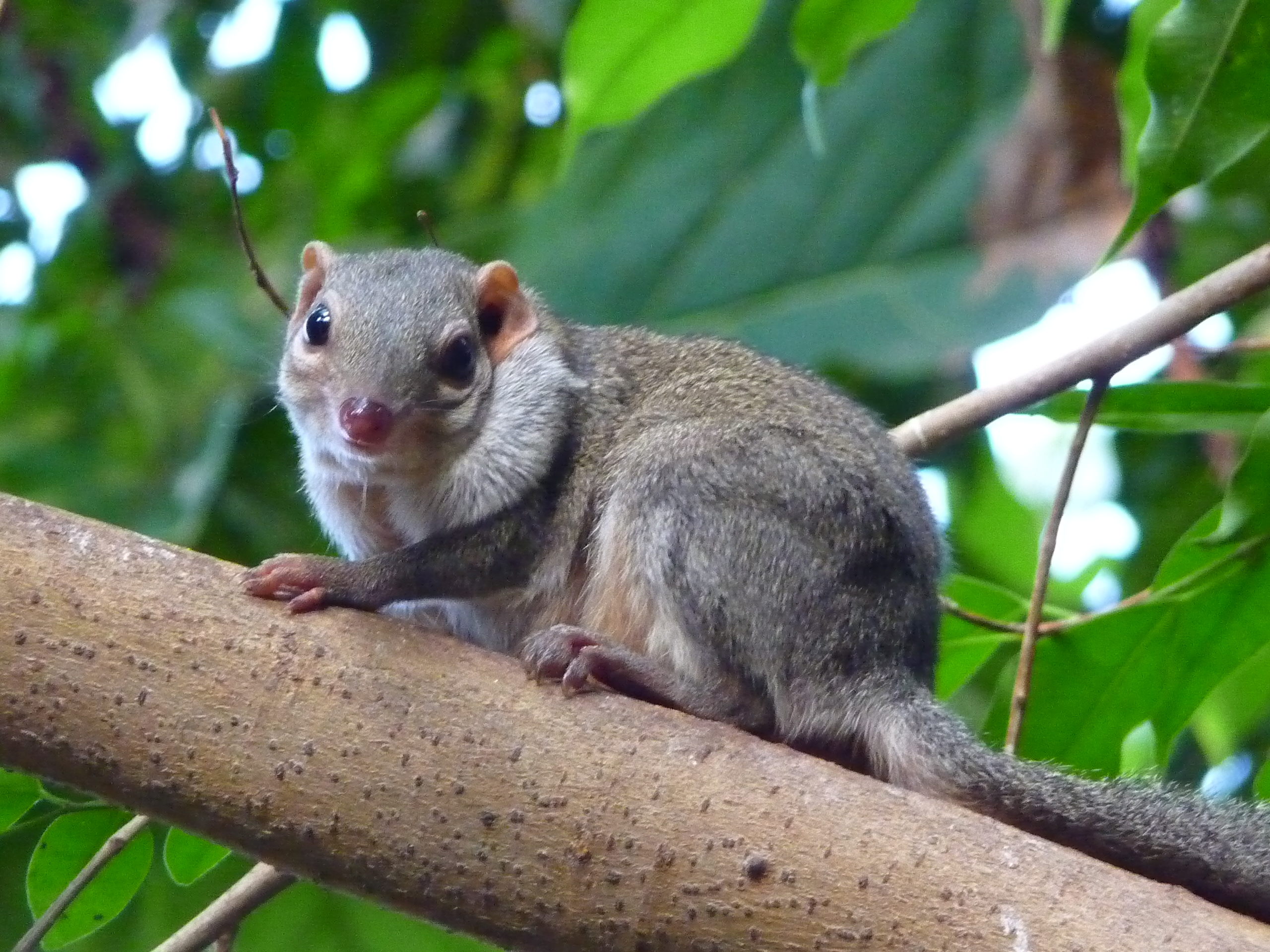 Ein Spitzhörnchen der Gattung Tupaia